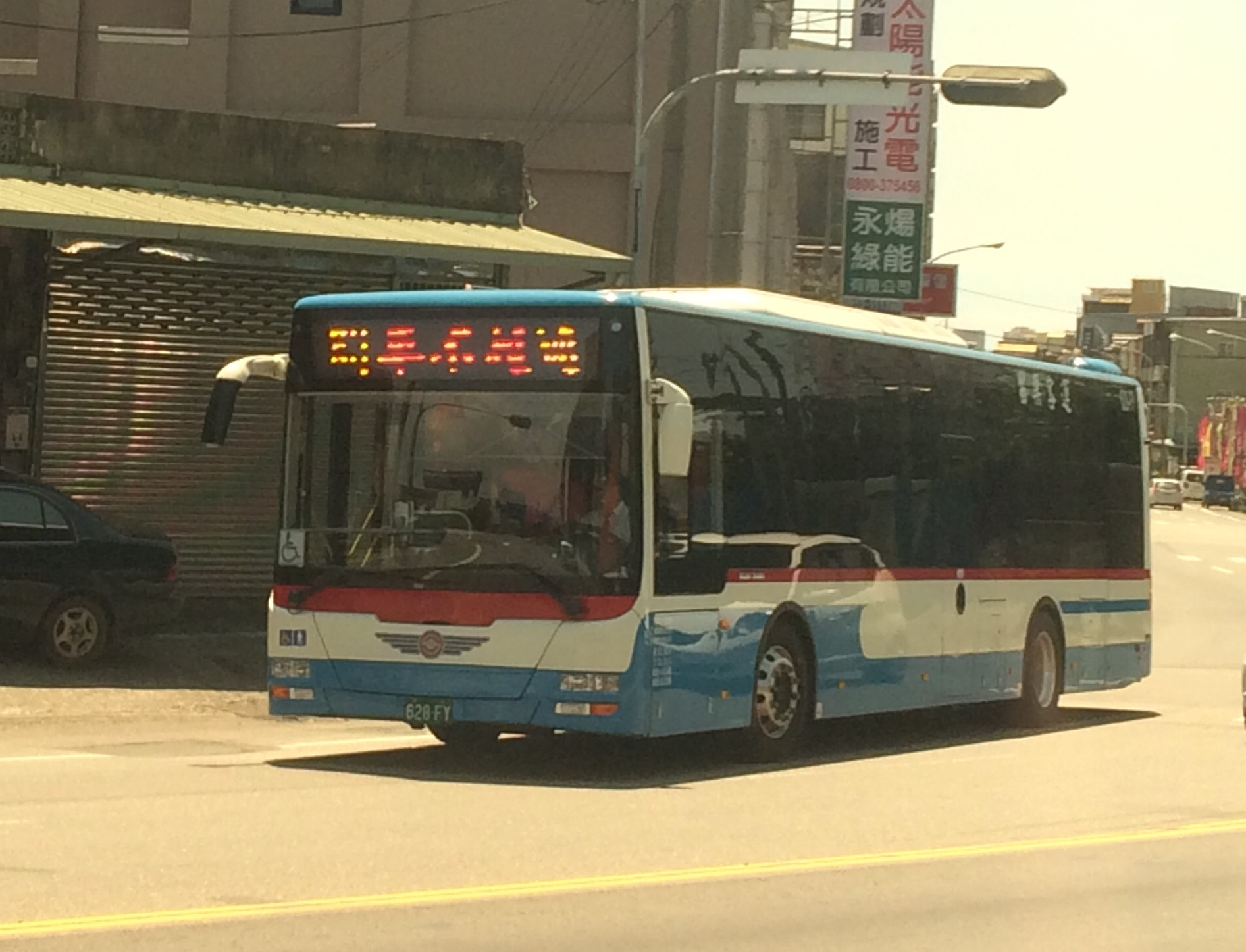 苗栗客運2015年金旅XML6125J15C大客車628-FY執行5806往南庄